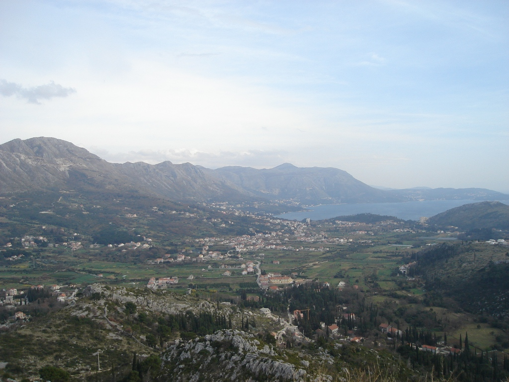 Village Čibača in Župa dubrovačka near Dubrovnik